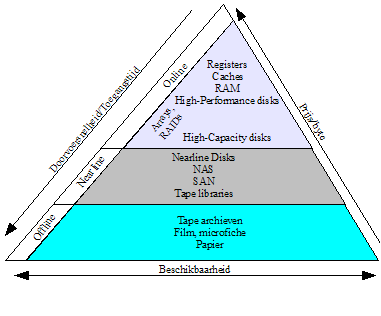 De opslagpyramide